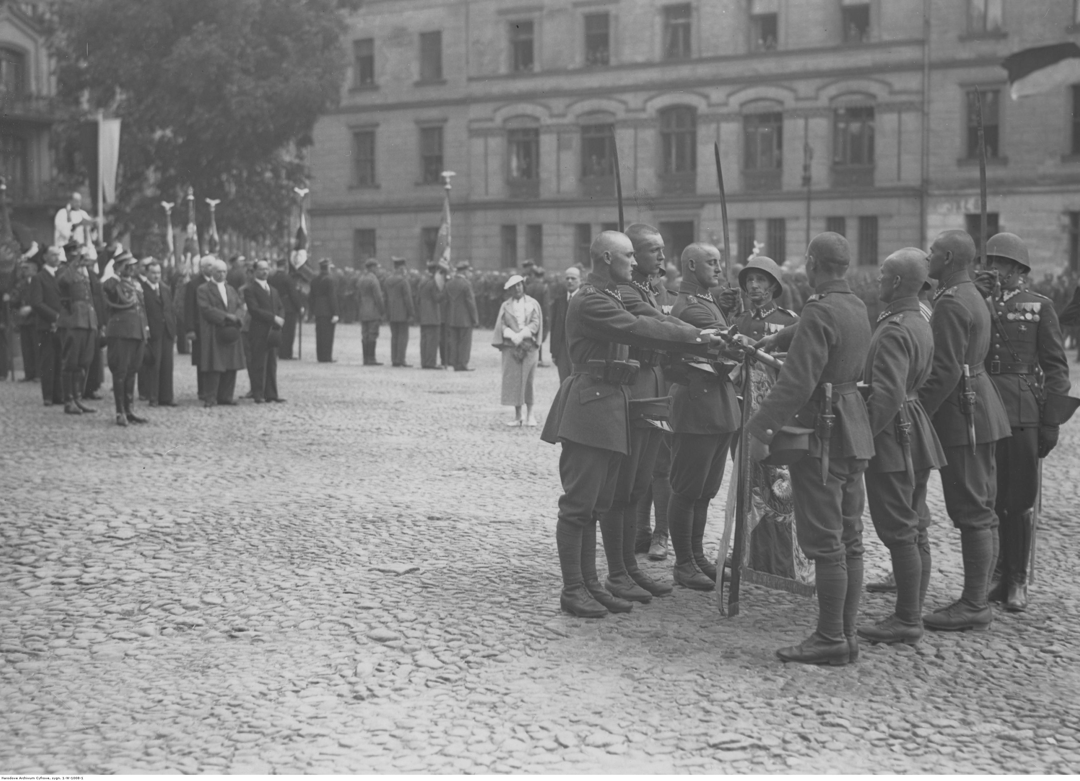 Przysięga rekrutów w Poznaniu. Uroczysta przysięga żołnierzy 58 Pułku Piechoty Wielkopolskiej, wyznania rzymsko-katolickiego, na placu Sapieżyńskim w Poznaniu, odebrana przez księdza kapelana majora Franciszka Dymarskiego (stoi na mównicy). Z lewej widoczni przedstawiciele władz miasta; 30 maja 1936. Koncern Ilustrowany Kurier Codzienny - Archiwum Ilustracji. Sygnatura: 1-W-1008-1